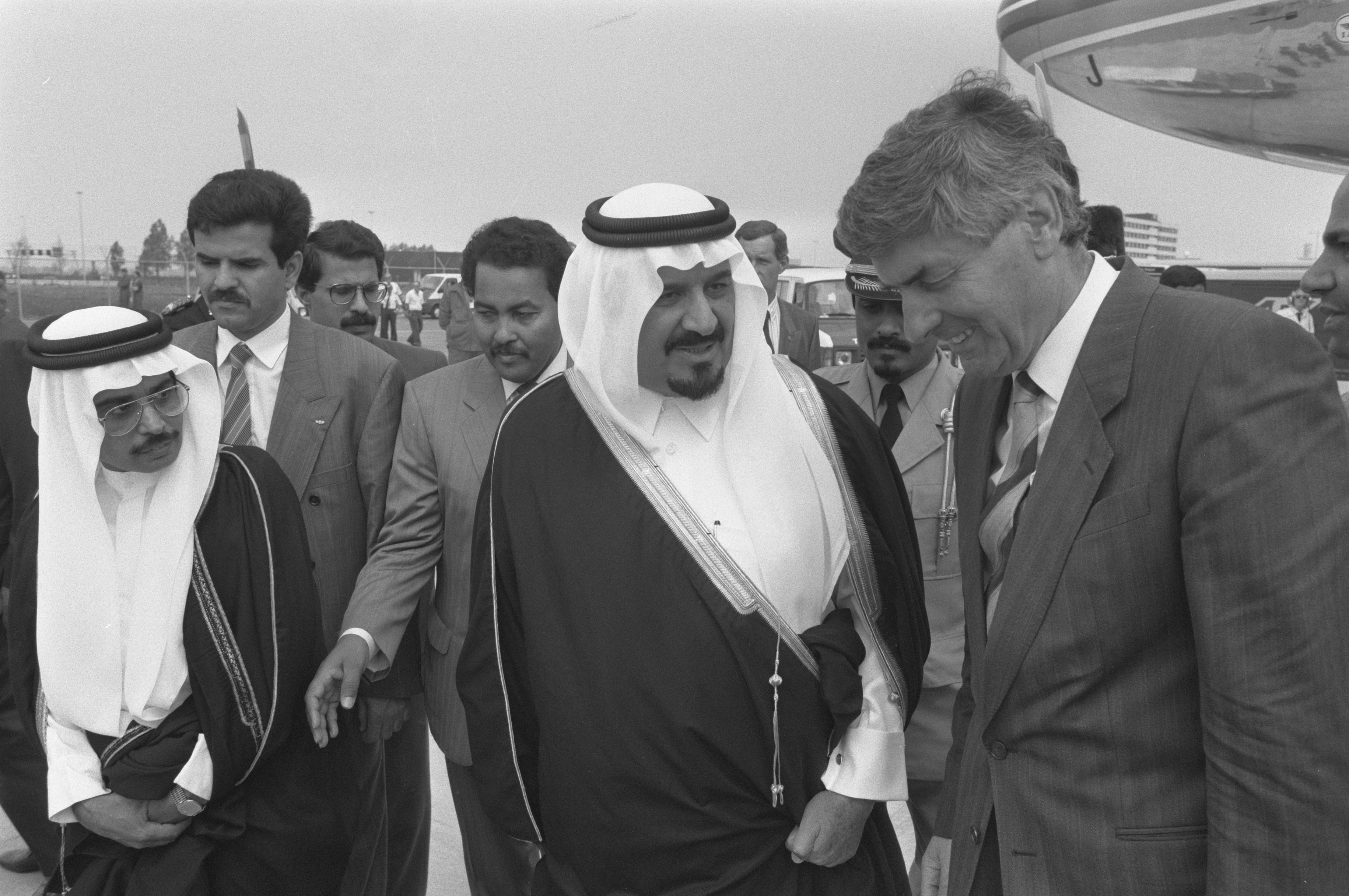 Collectie / Archief : Fotocollectie Anefo Reportage / Serie : Premier Lubbers begroet op Schiphol vice-premier en minister van Defensie Prins Sultan Bin Abdul Aziz Bin Saud van Saoedie-Arabië Beschrijving : aankomsten, ministers, premiers, sultans, Bin Abdul Aziz Bin Saud Datum : 15 juni 1989 Locatie : Noord-Holland, Schiphol Trefwoorden : aankomsten, ministers, premiers, sultans Persoonsnaam : Bin Abdul Aziz Bin Saud, Lubbers, Ruud Fotograaf : Croes, Rob C. / Anefo Auteursrechthebbende : Nationaal Archief Materiaalsoort : Negatief (zwart/wit) Nummer archiefinventaris : bekijk toegang 2.24.01.05 Bestanddeelnummer : 934-4704